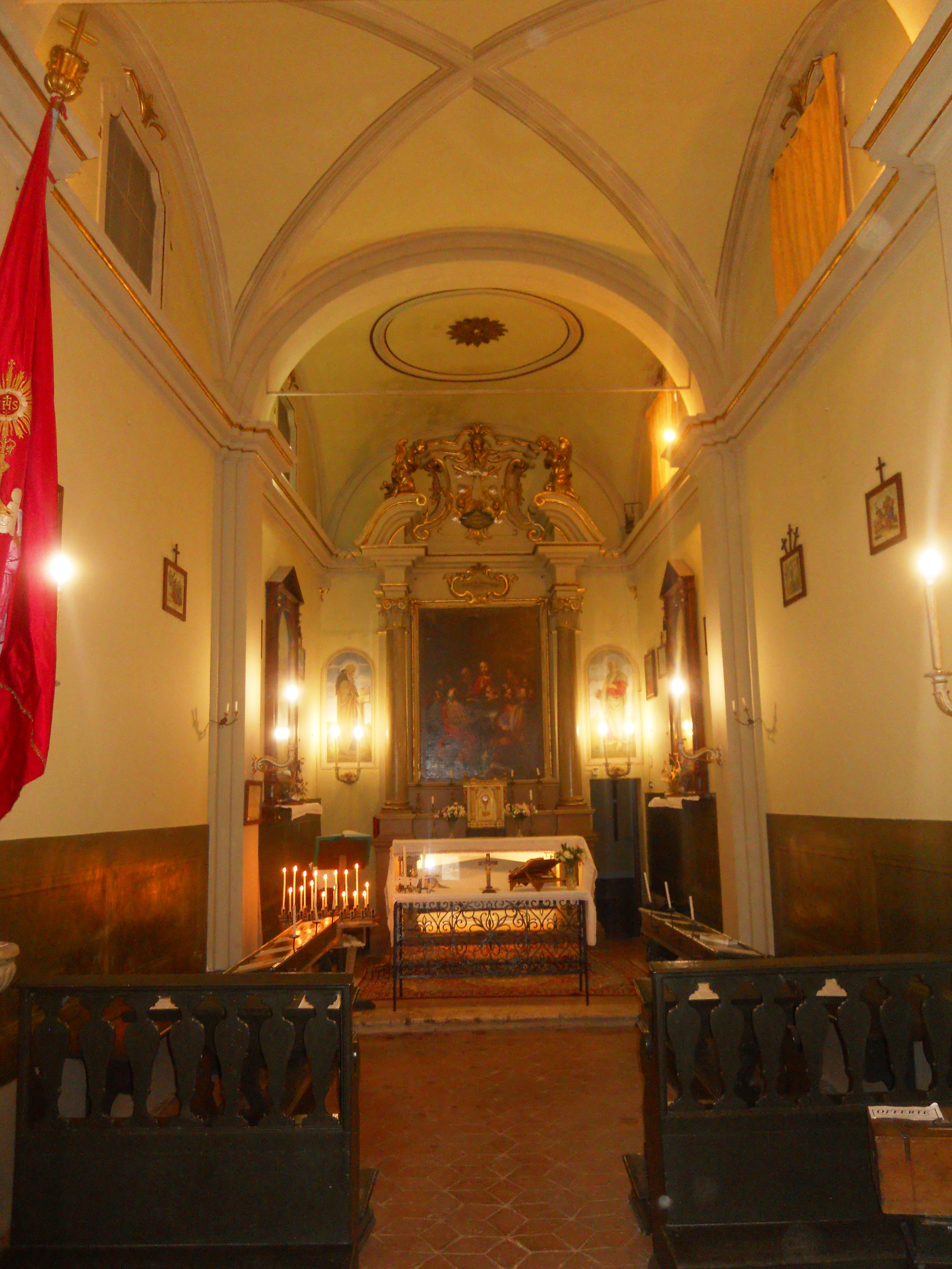 Interno della chiesa della Compagnia in Montisi